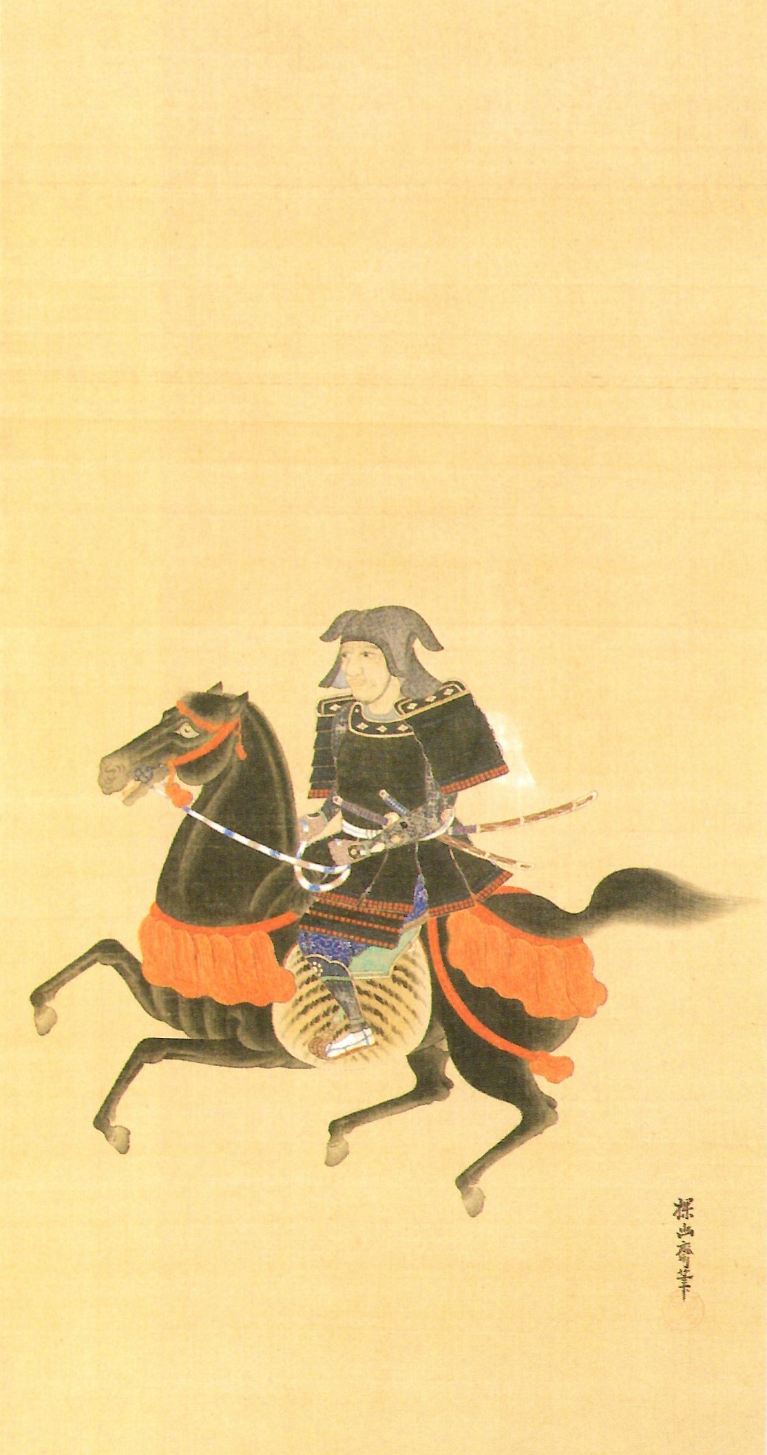 成瀬正虎の肖像。